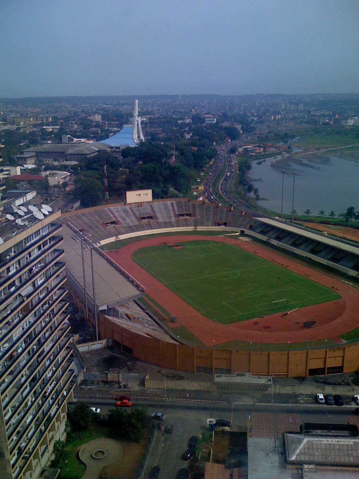 Stade Félix Houphouët-Boigny à Abidjan, Côte d'Ivoire (Vue aérienne)